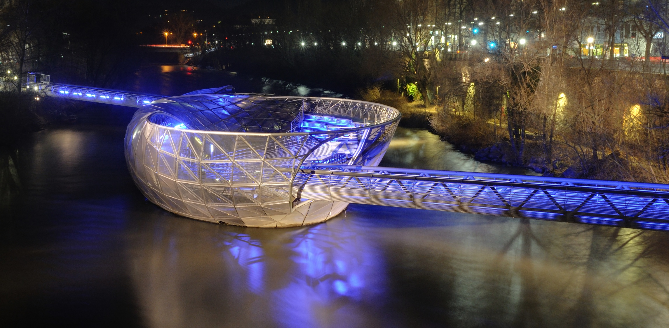 Graz: Murinsel bei Nacht